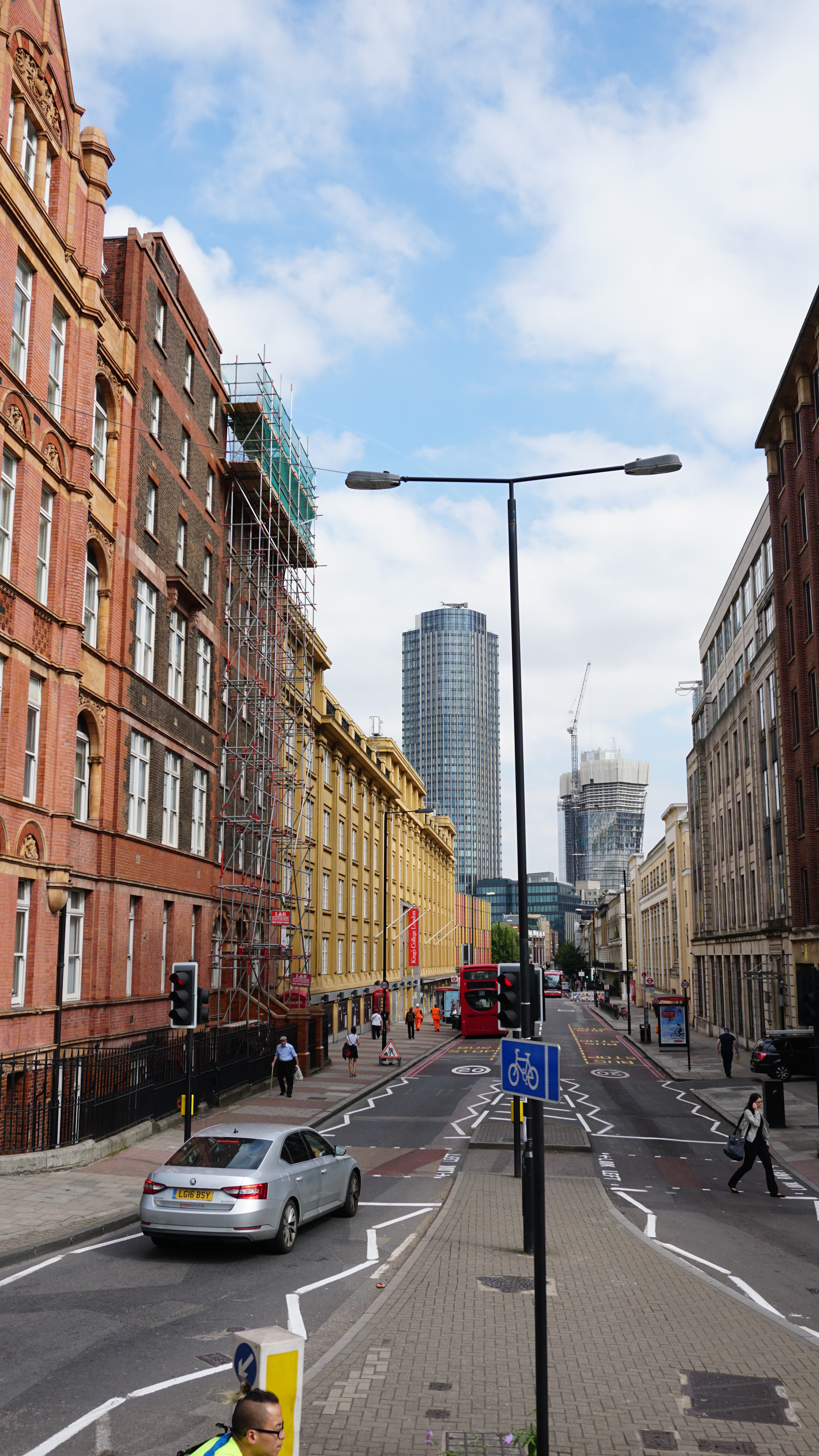 A little visit in London Une petite visite a Londres